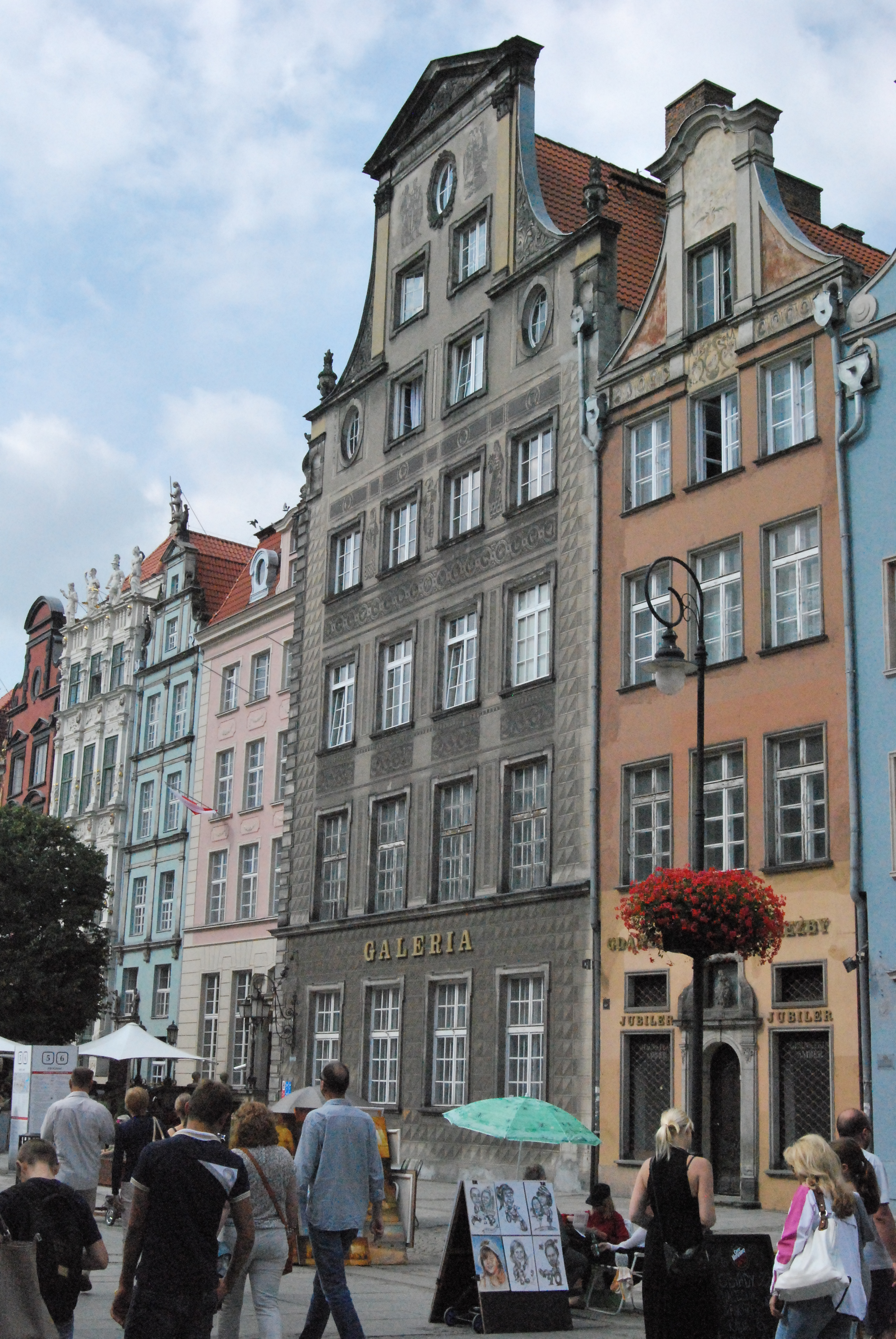 województwo pomorskie; Gdańsk; Kamienica ul. Długi Targ 38. Autorami sgraffitowej dekoracji są Halina Bajońska, Roman Usarewicz, Jerzy Zabłocki.